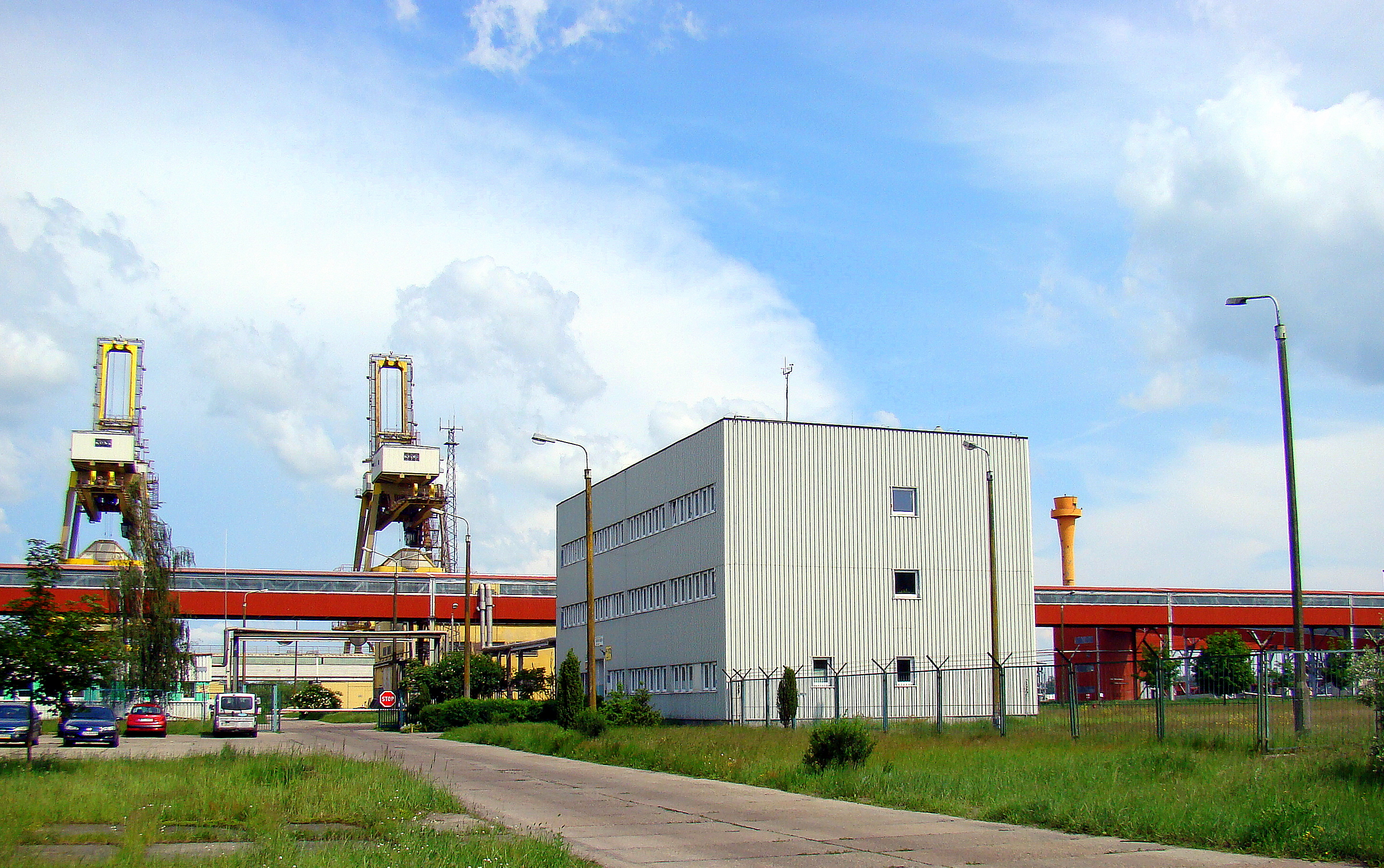 Port Police, (Port Morski), Województwo zachodniopomorskie, Polska